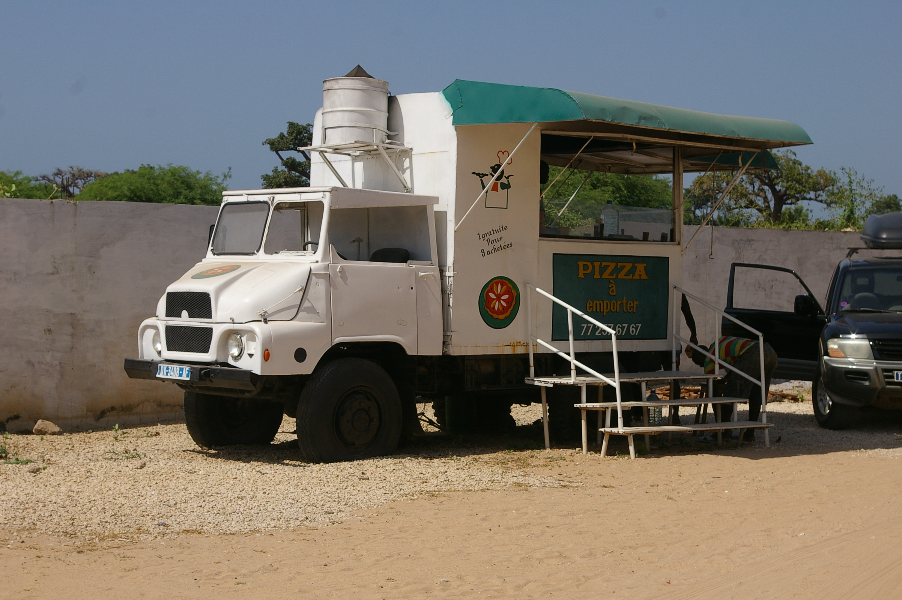 Pizzeria dans un camion immobilisé, à Saly Sénégal